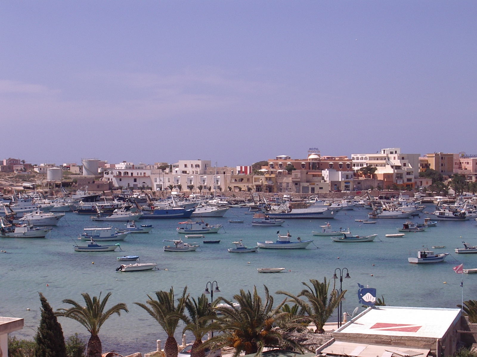 Vista di Lampedusa (AG), l'unica isola italiana in Africa e il comune più a sud d'Italia.